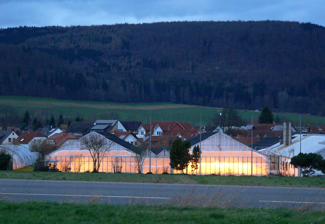 Gewächshäuser von Ernst Benary Samenzucht in Gimte bei Hann. Münden